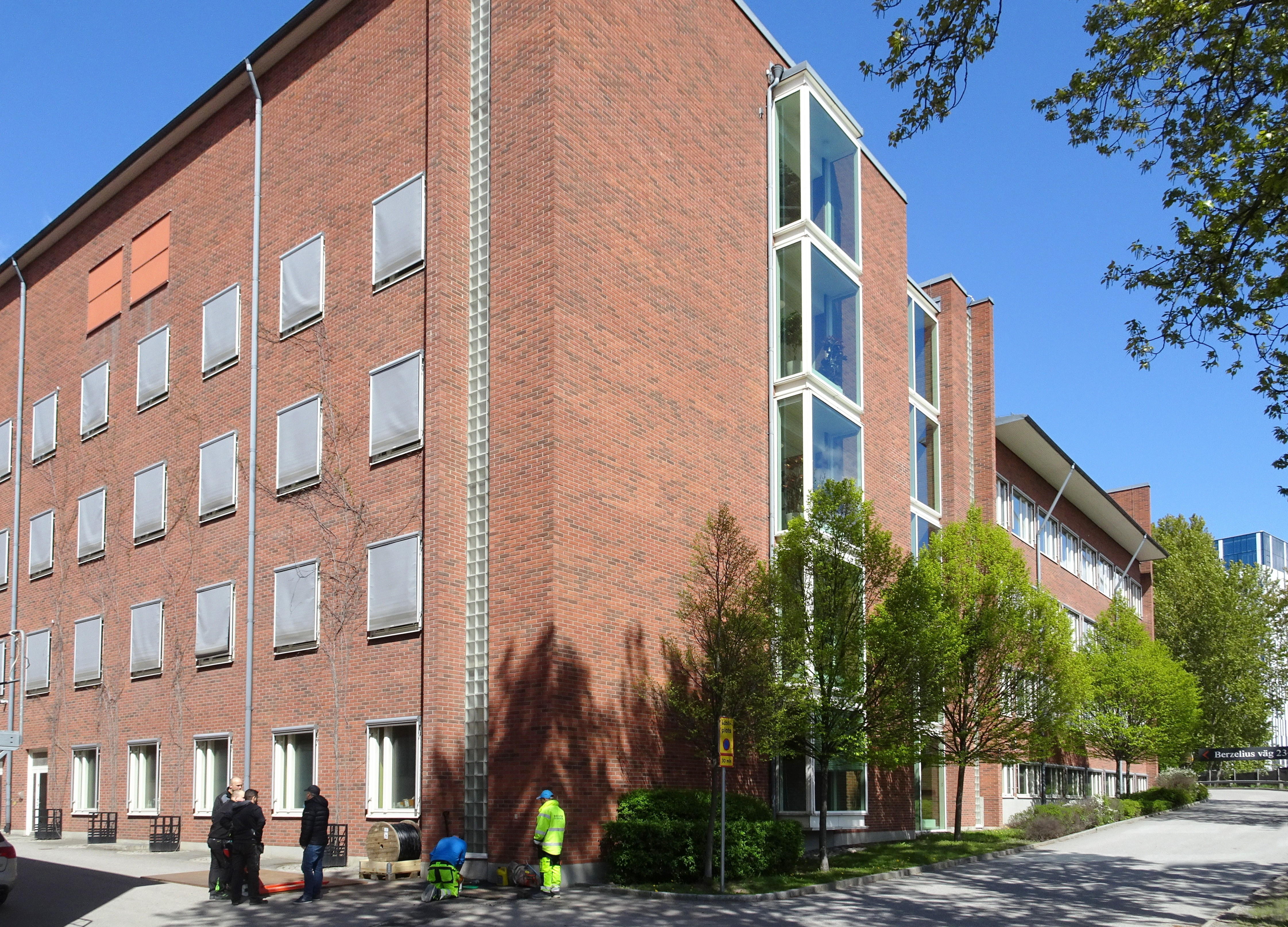 CGB Laboratoriet (Centrum för Genomik och Bioinformatik), Berzelius väg 35, byggår 2001, arkitekt Bjurström & Brodin arkitektkontor